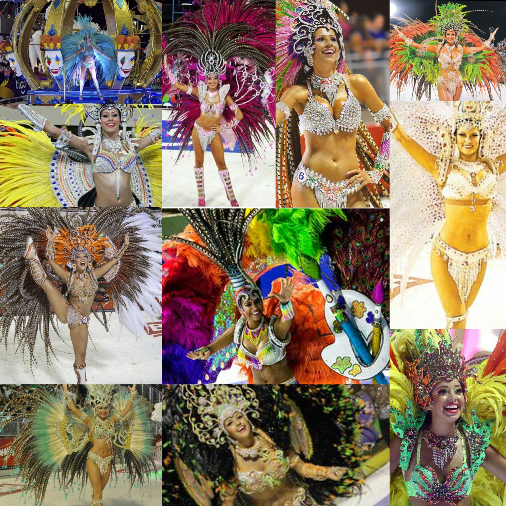 Figuras del Carnaval Encarnaceno